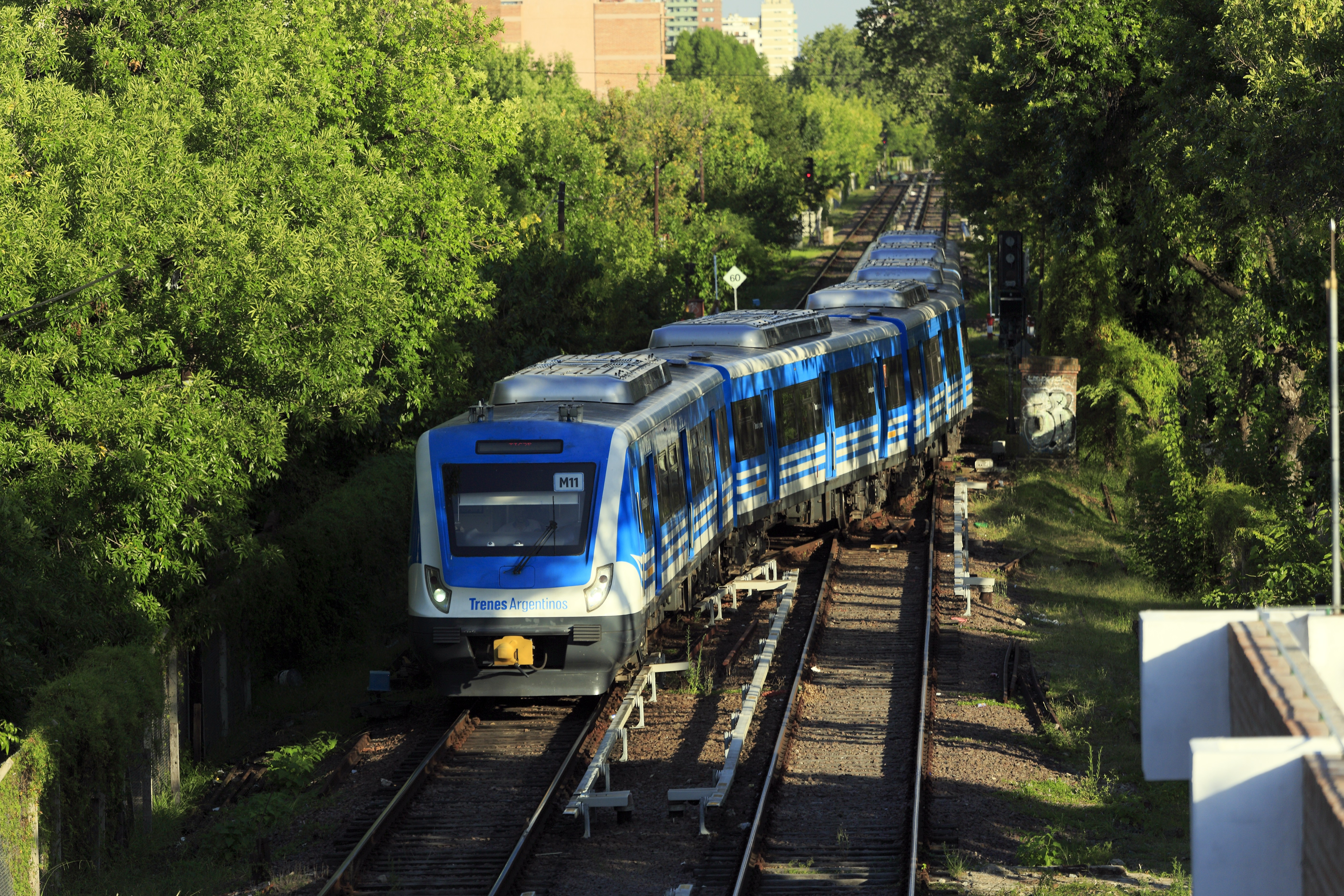 Zug von Nuñez nach Tigre, er hat den Endpunkt fast erreicht. Die Stromschienenanlage ist neu mit Aluminiumstromschienen und »Britzer Trägern«, Stromschienenaufläufe wurden nicht vorgesehen. Die Stromschienenlücken sind jedoch kein Problem, die Züge sind fest gekuppelt und alle Stromabnehmer miteinander verbunden